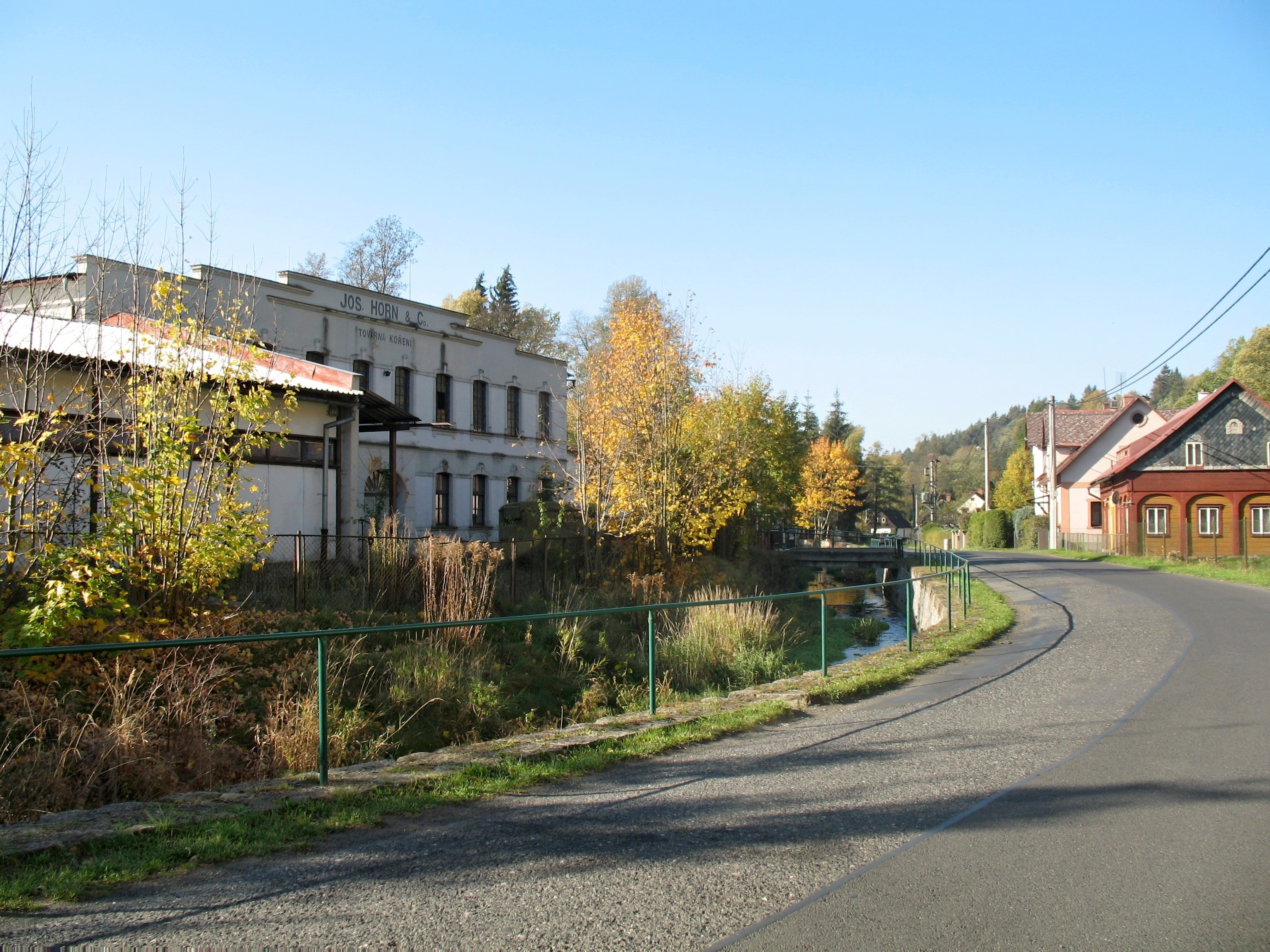 Bývalý vodní mlýn na koření Josefa Horna v Dolní Chřibské, okres Děčín